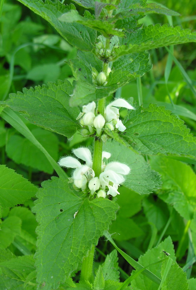 Baltažiedė notrelė (Lamium album) Šeima. Notreliniai (Lamiaceae) Foto: Algirdas, 2006 m. birželio 3 d., Lietuva